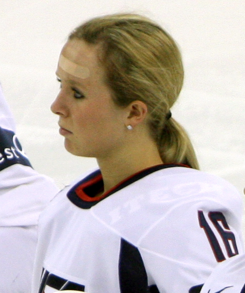 usa2